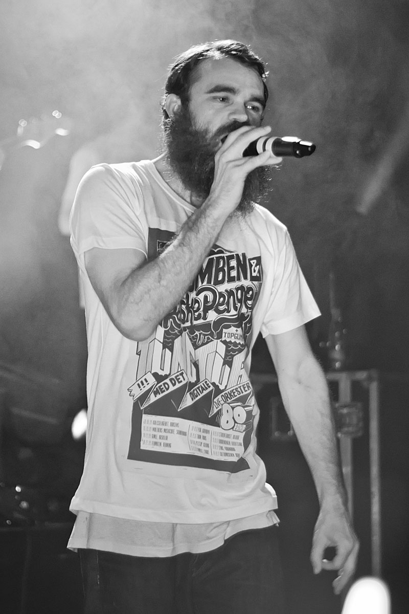 Саха тыла: Raske Penge ved en koncert på Forbrændingen 1. november 2012